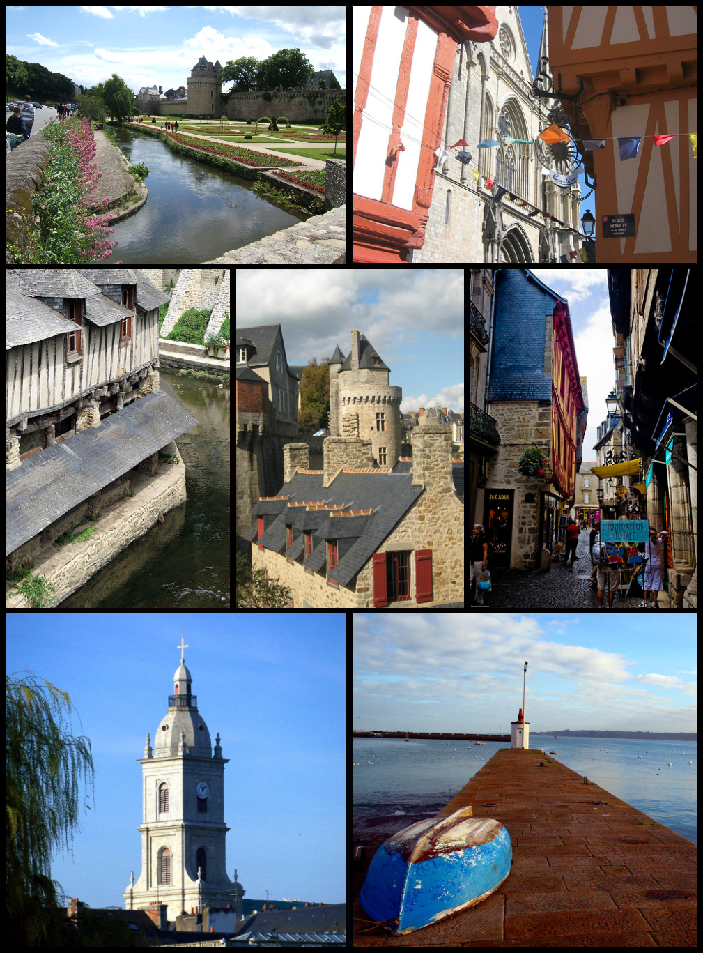 Montage : De haut en bas de gauche à droite